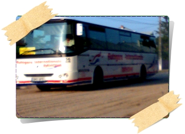 Autobuz circuland pe soseaua din Nenciulesti